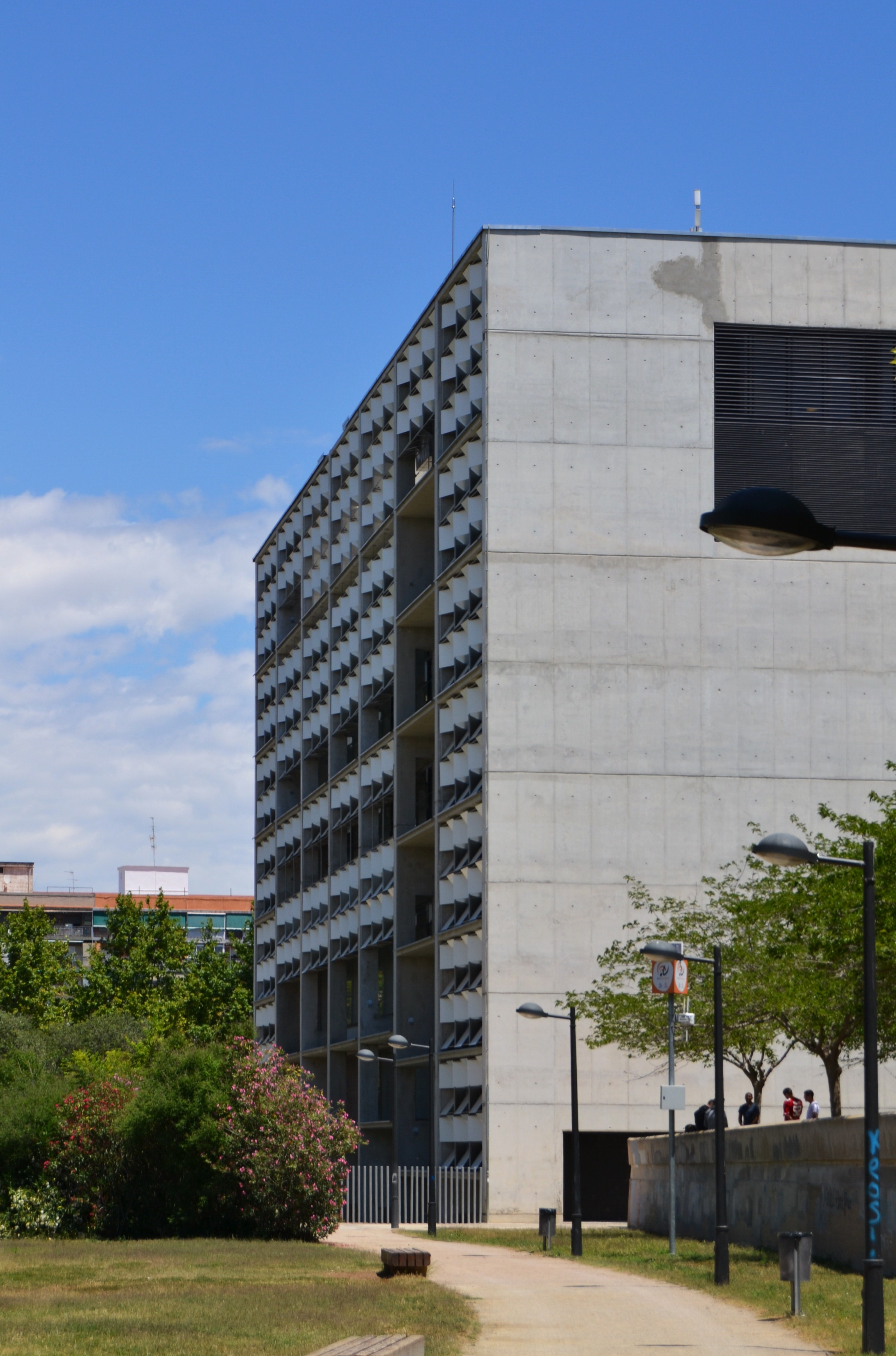 La Rambleta des del parc.